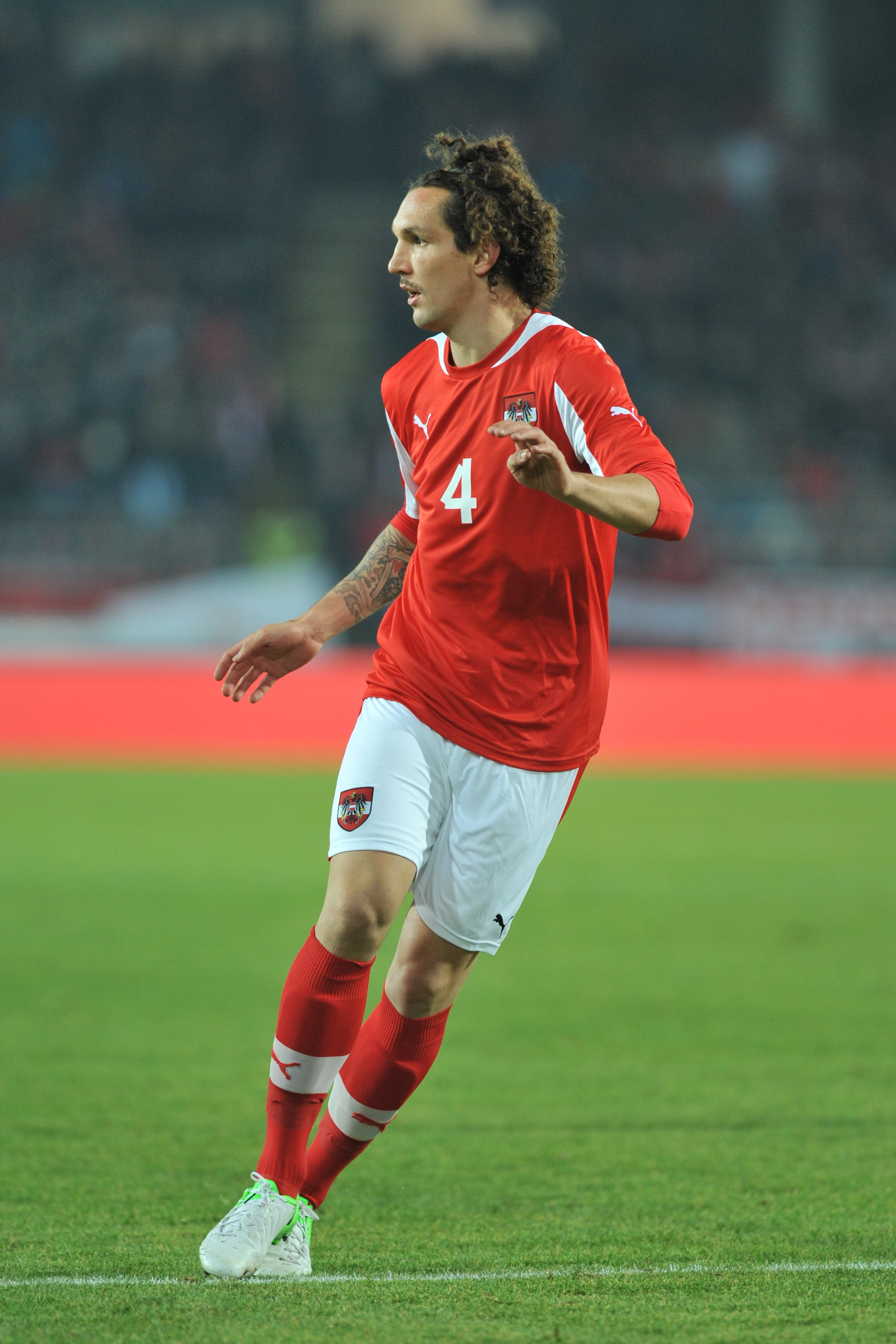 ÖFB freundschaftliches Länderspiel - Österreich vs Elfenbeinküste am 14. November 2012 4: Emanuel Pogatetz